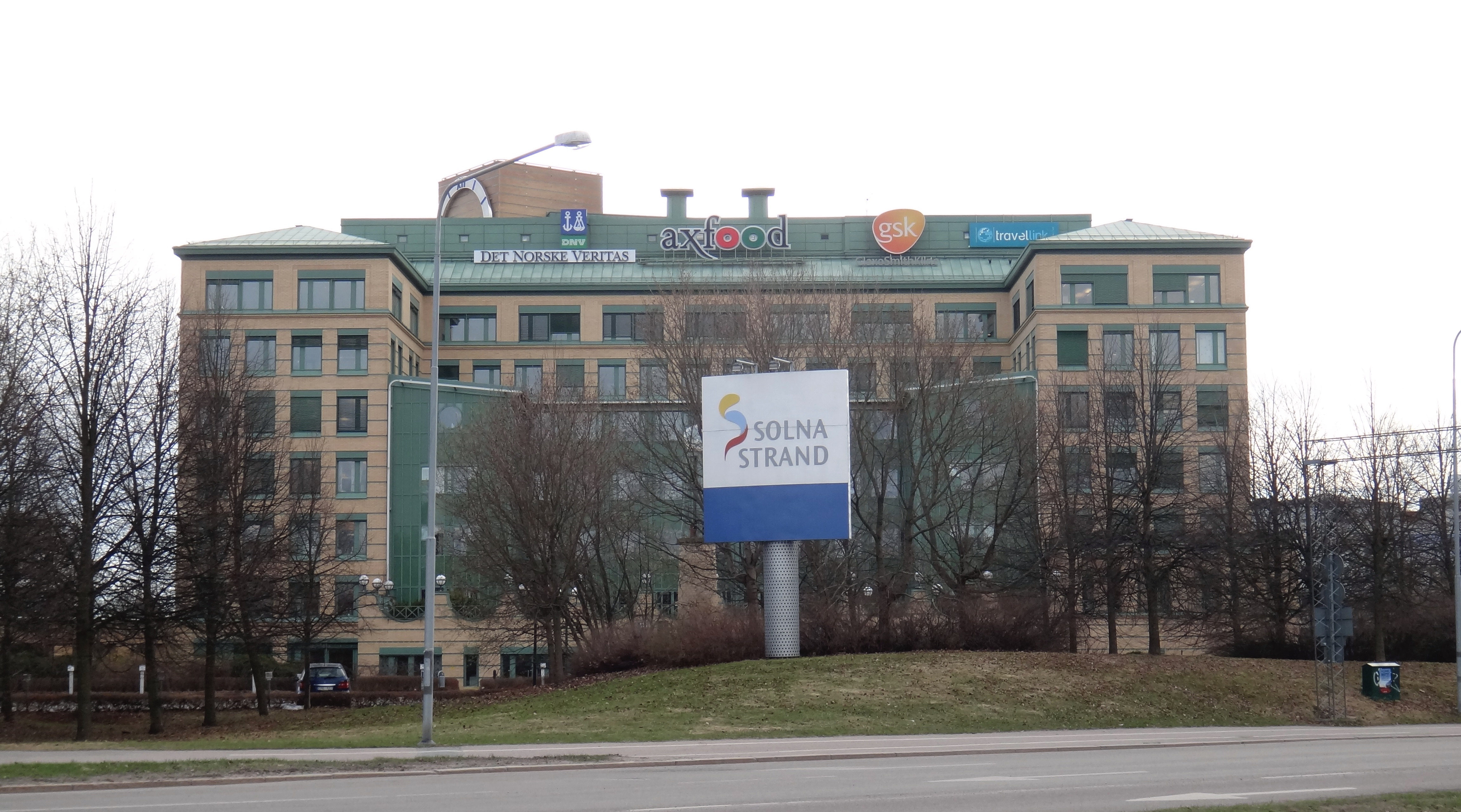 Hemvärnsgatan 9 i Solna strand, sett från nordost.